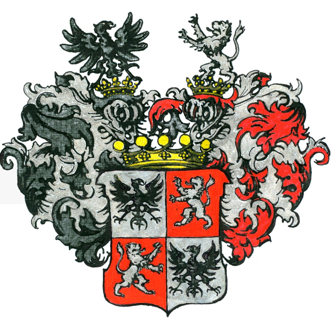 Wappen der Freiherrn von Sohlern Urheber: unbekannter Heraldiker